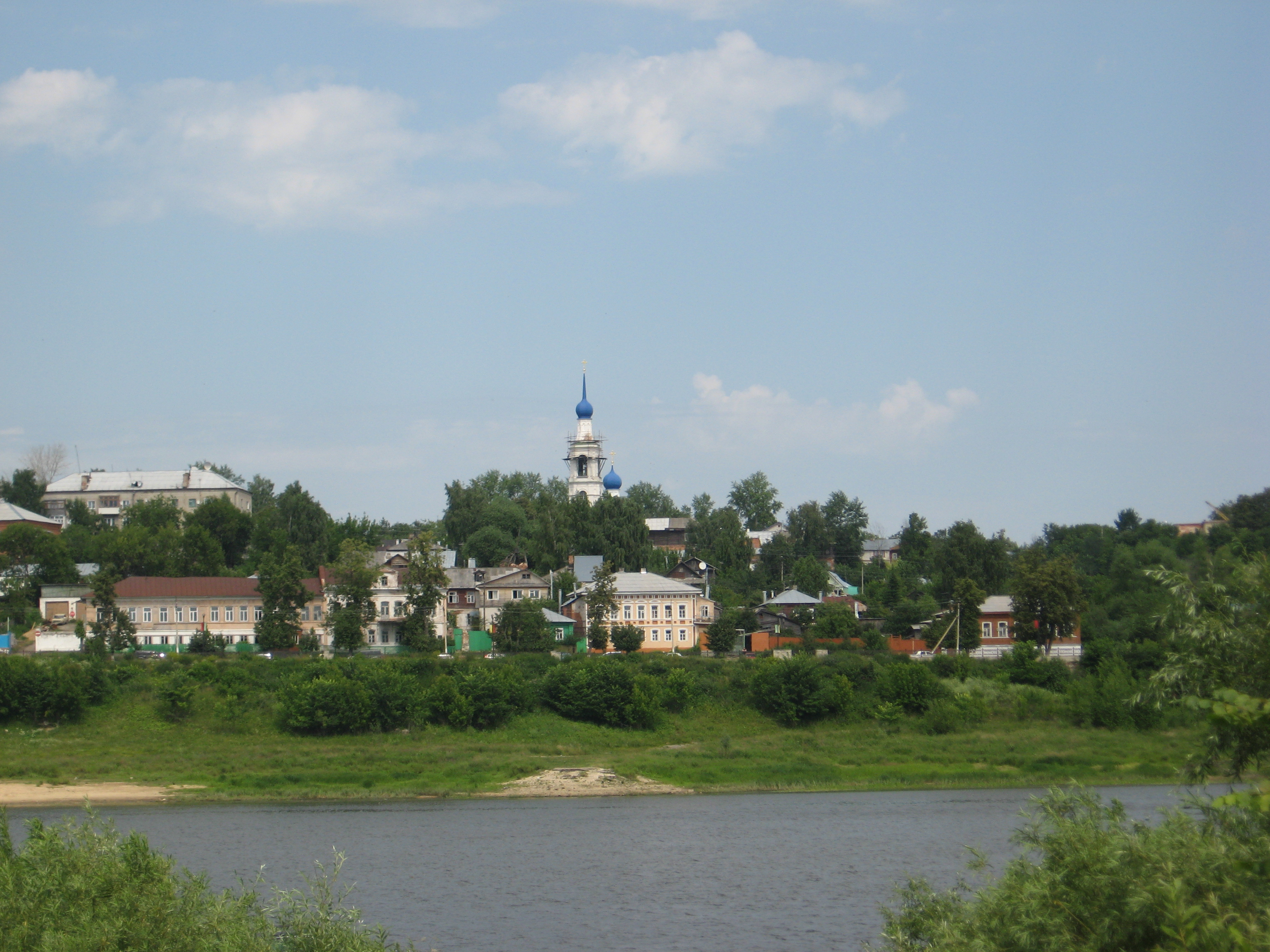 Вид на г.Касимов с противоположного берега р.Ока